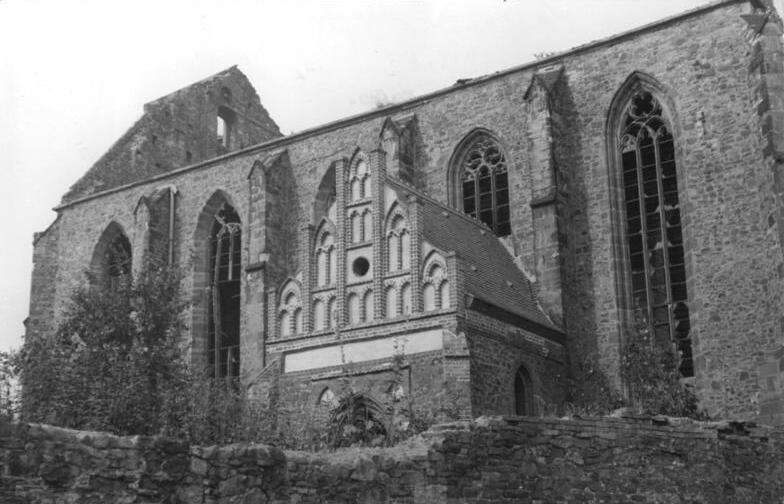 Magdeburg, Petri-Kirche, Ruine Zentralbild Biscan 1.10.1952 Wertvolles Bauwerk durch Mithilfe der Bevölkerung gerettet. Zu der im Jahre 1945 durch die amerikanischen Bomber zerstörten Kirchen Magdeburgs gehört auch die Petrikirche. Die Sakristei dieser Kirche, ein Rest des einzigen backsteingotischen Baues der Stadt hat besonders kunsthistorischen Wert. Auf Kosten der DDR wurde die Sakristei instandgesetzt. UBz: Die Ruine der Petri-Kirche, (Im Vordergrund die wiederaufgebaute Sakristei)